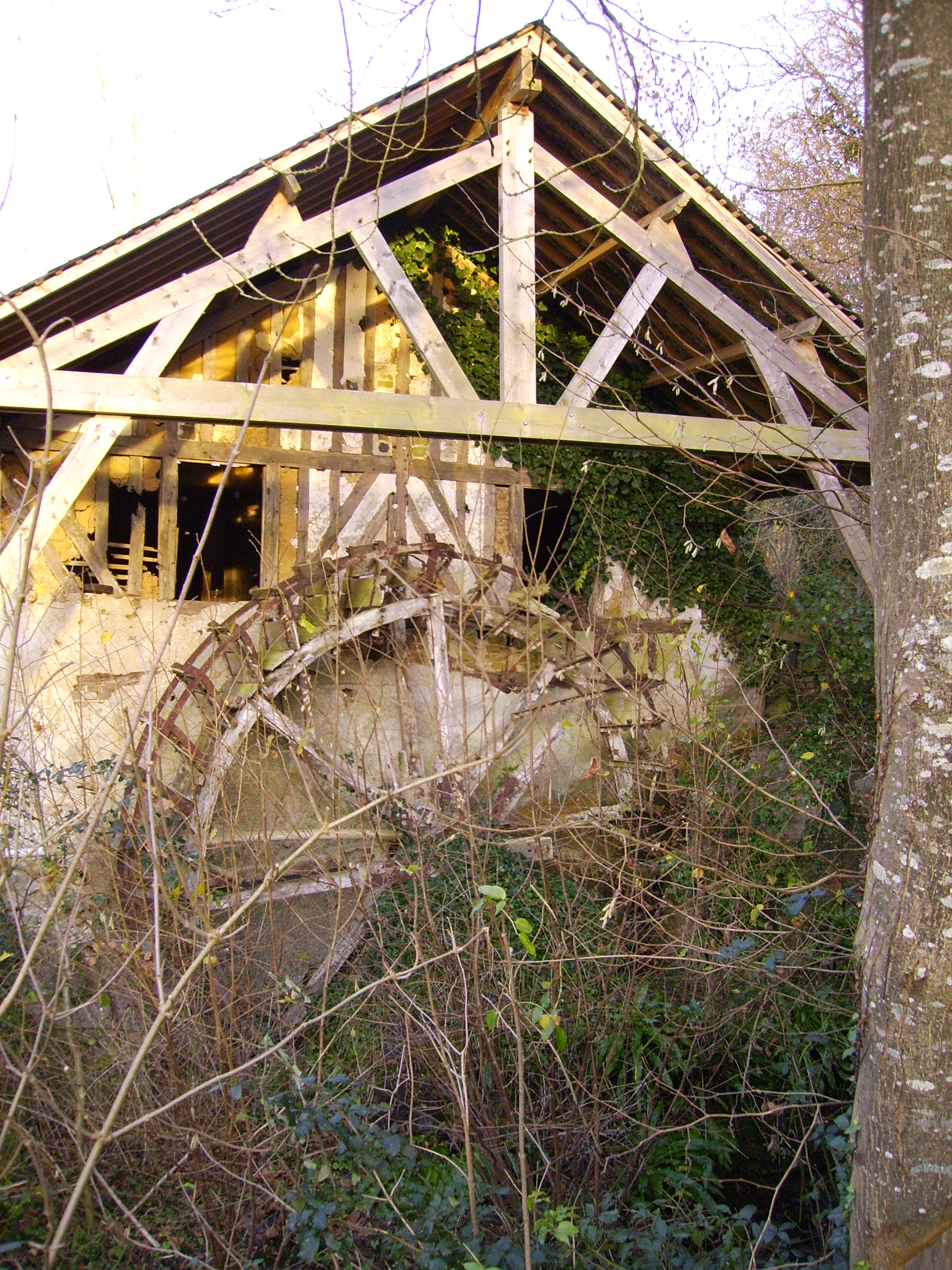 Moulin de la Rivière d'Angerville dans l'Eure (27)